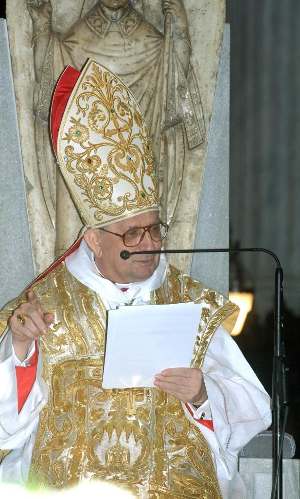 S.E. mons. Alessandro Maggiolini